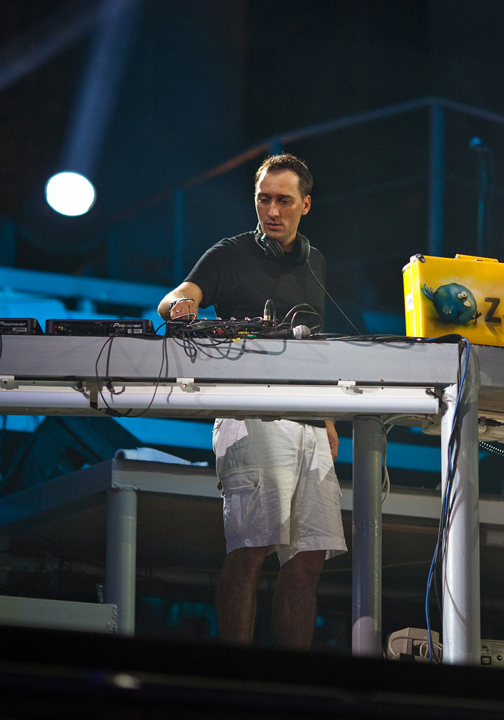 Paul van Dyk